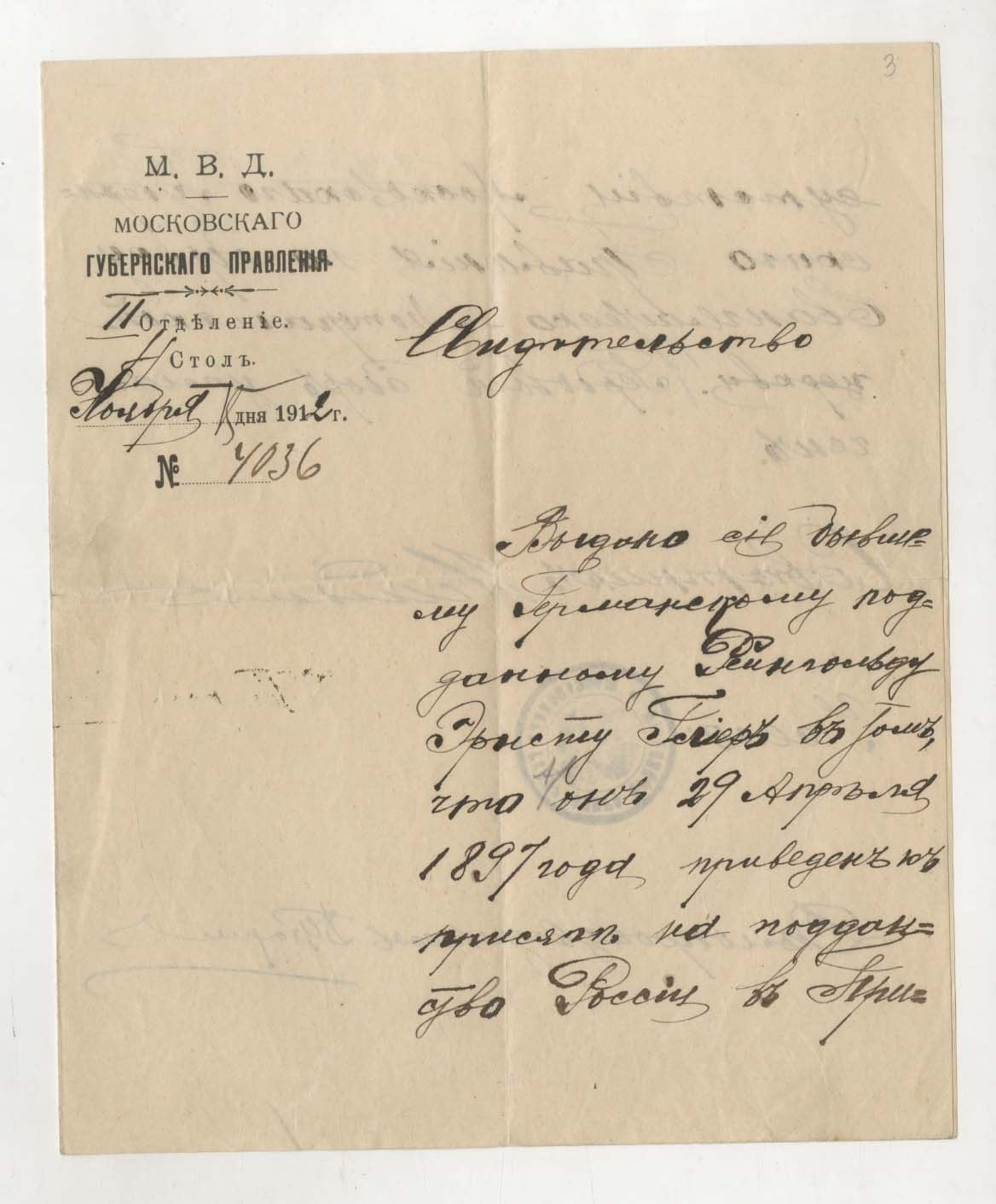 1-я страница Свидетельства о приведении Р. М. Глиэра к присяге на подданство России от 29 апреля (ст. ст.) 1897 года